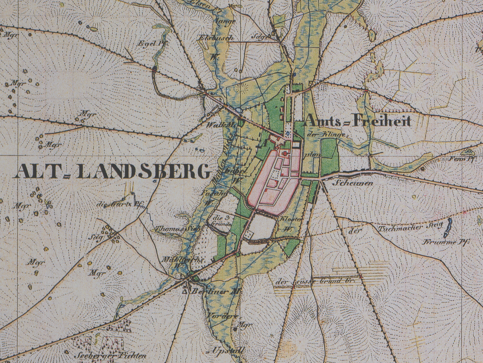 Altlandsberg, Landkreis Märkisch-Oderland, Brandenburg, Ausschnitt aus dem Urmesstischblatt 3448 Altlandsberg von 1839